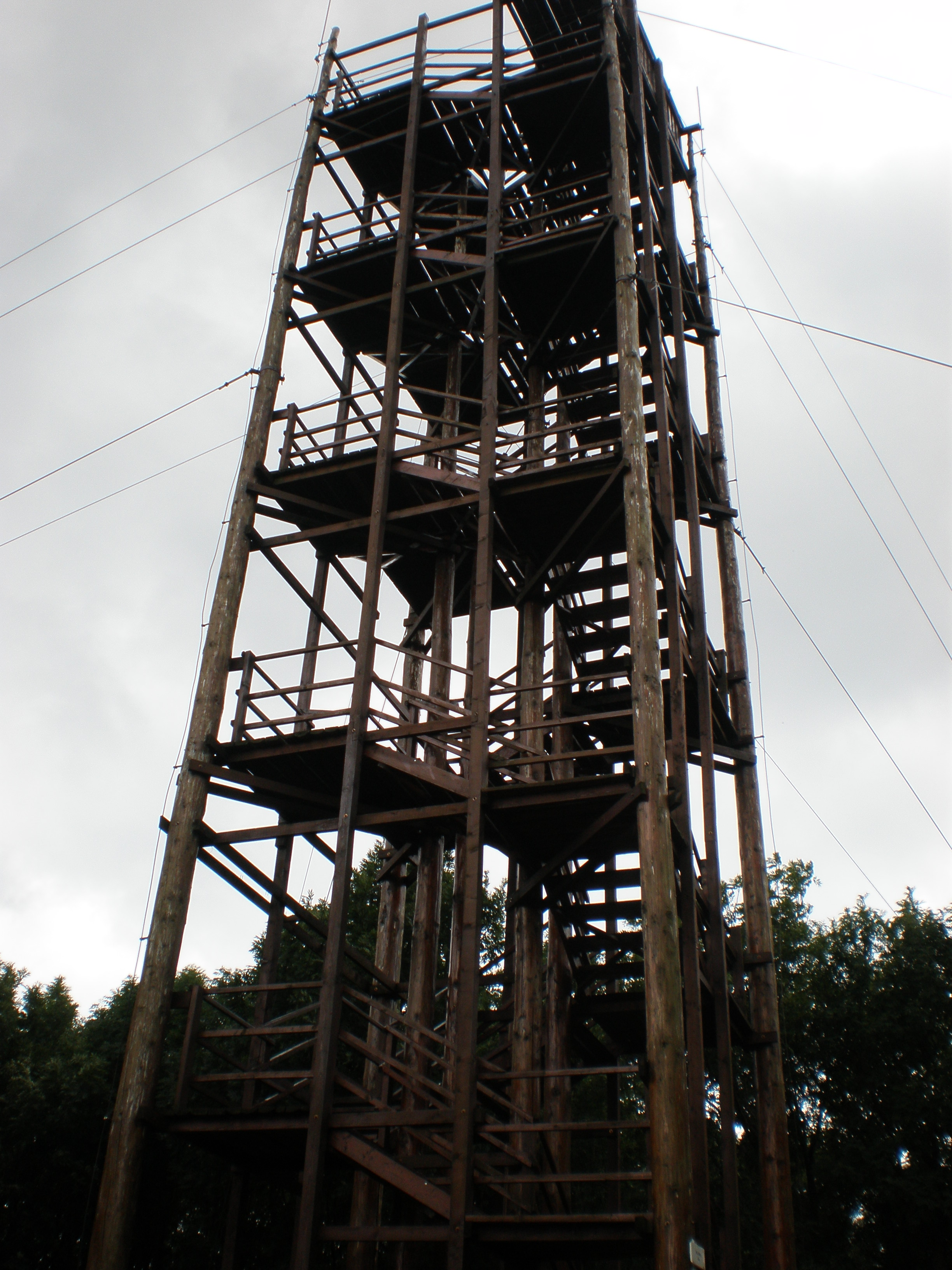 Vyhliadková veža na vrchu Veľká homoľa, Malé Karpaty.